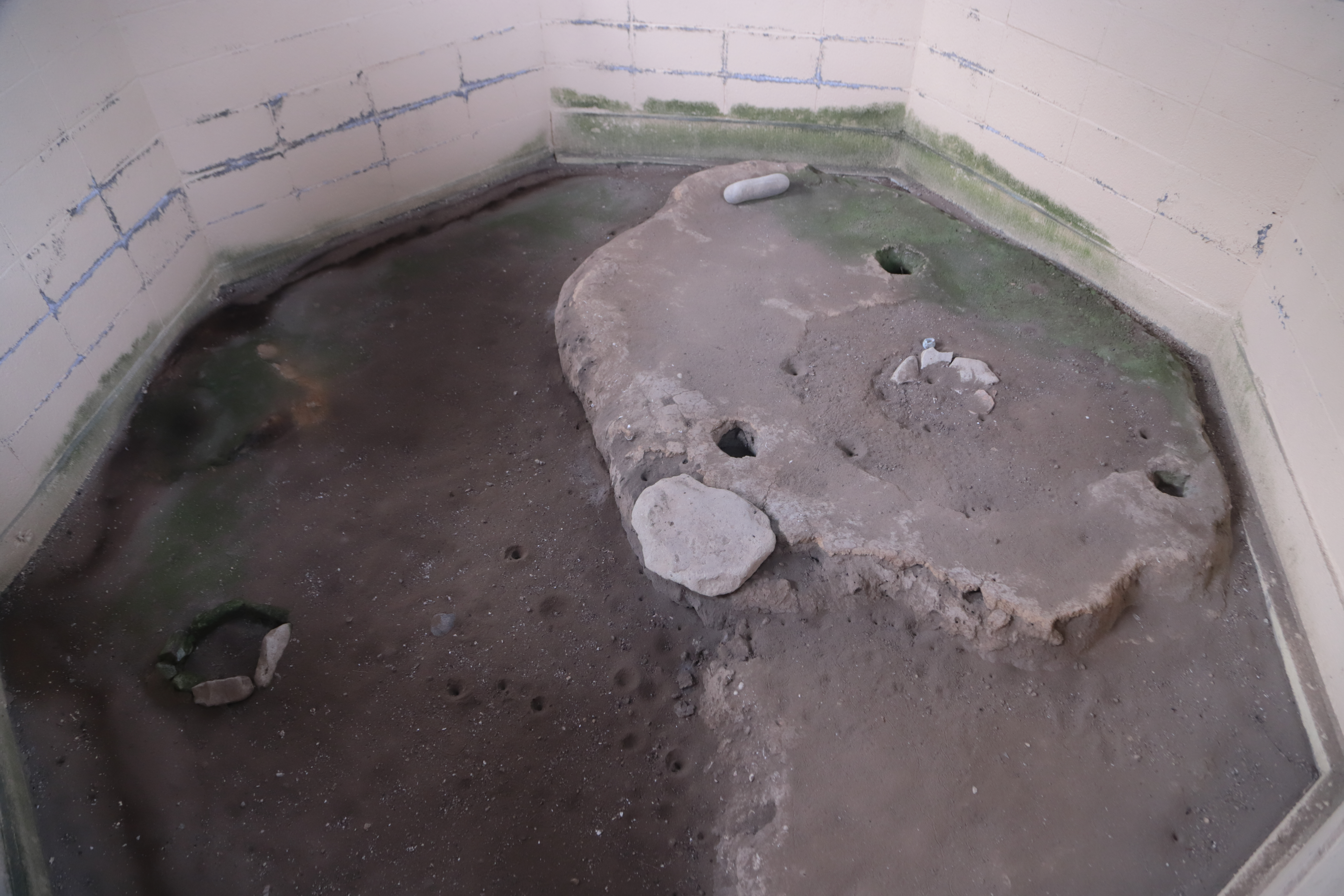 朝日貝塚保存舎内部。2019年12月8日撮影。